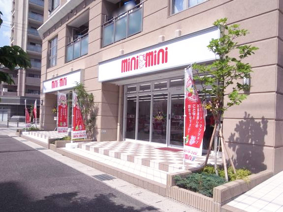 ミニミニ春日井南店